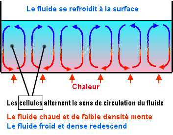 Illustration des cellules de Bénard - origine wiki en: créé par l'utilisateur Thérésa Knott, traduit et modifié pour wiki fr